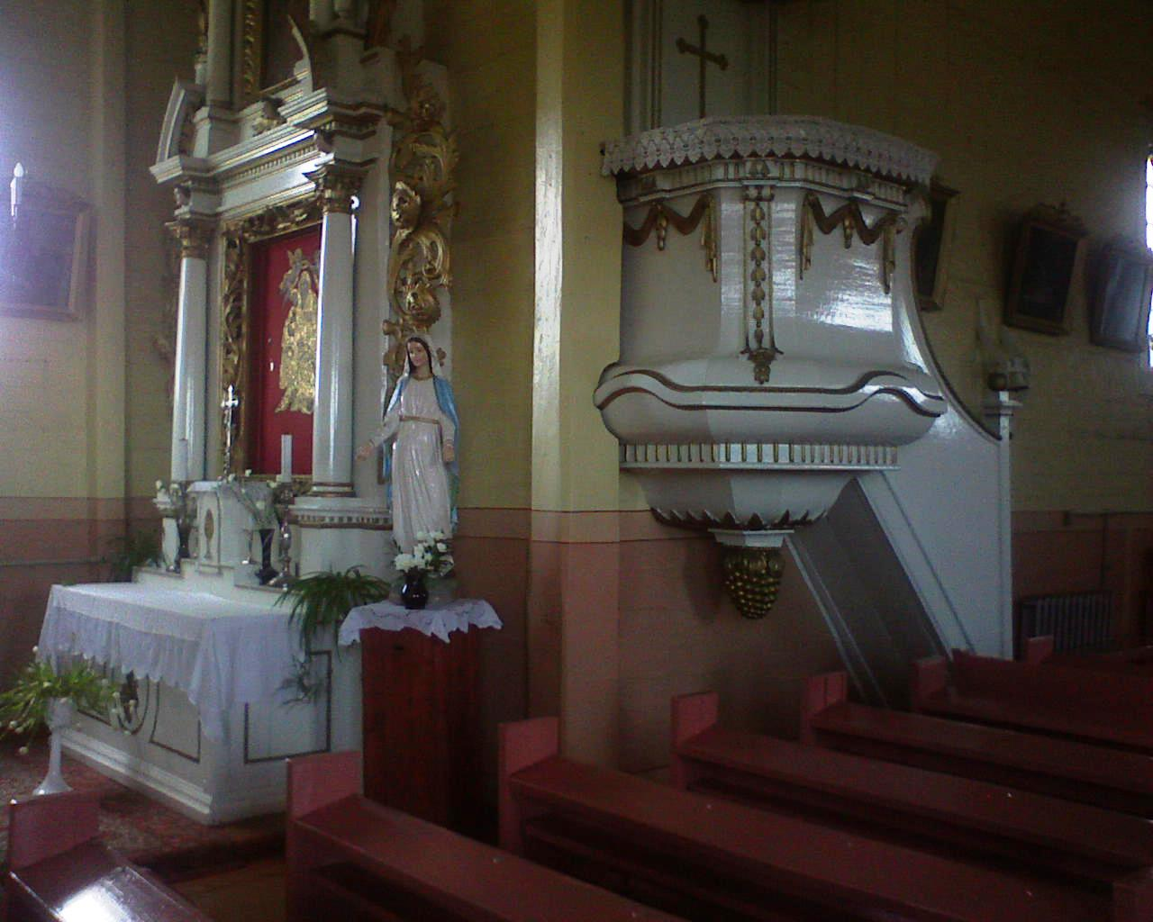 Užvenčio bažnyčios vienas iš 5 altorių